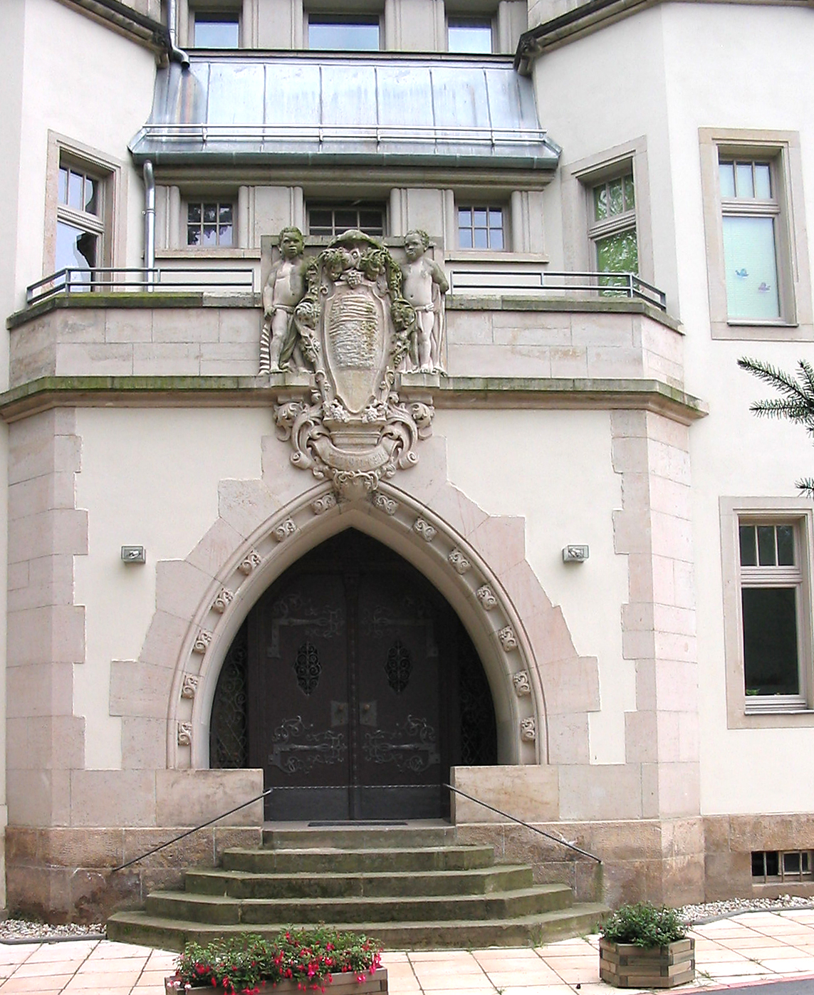 Radebeul, Mohrenhaus, Hauptportal